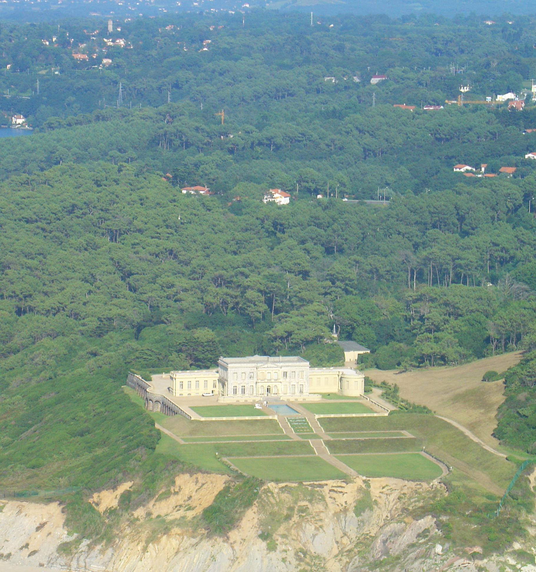 Le "Castel Biarritz", puis "Pavillon Royal", construit en 1877 au lieu dit "Haritzako sablia" à Bidart. La Société Anonyme des Bains de Mer l'érige comme centre de balnéothérapie. La propriété allant d'échec en échecs commerciaux au cours du XXème siècle, elle est finalement rachetée par la famille de l'industriel Latécoère.